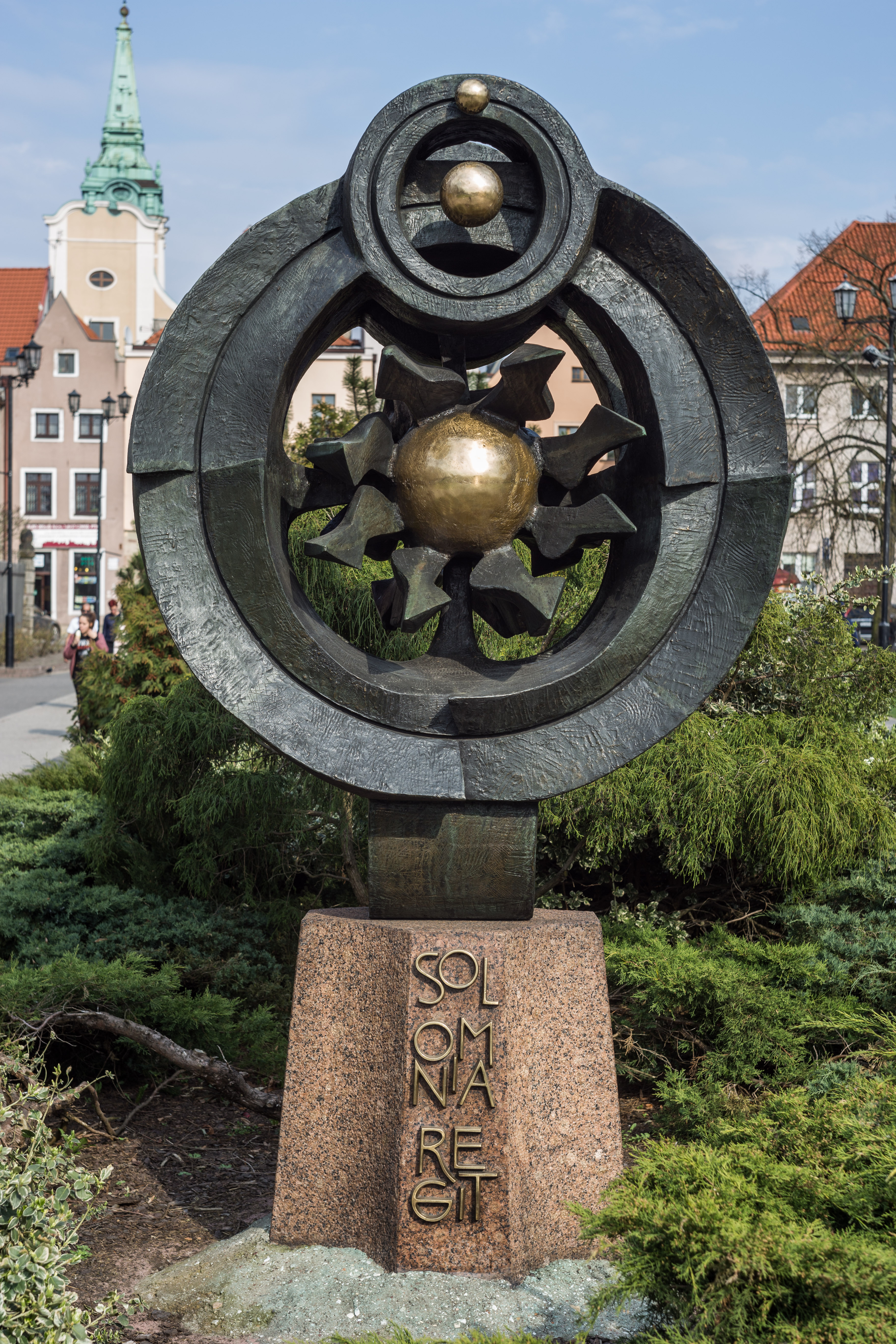 Pomnik "Helios", upamiętniający 500 rocznicę urodzin Mikołaja Kopernika, usytuowany przy pl. Rapackiego w Toruniu, autorstwa Józefa Kopczyńskiego.